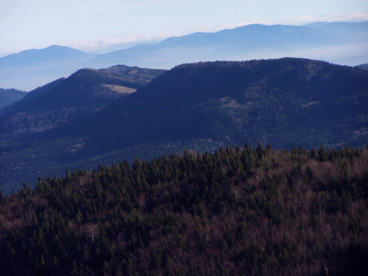 Ostra, Cichoń (Beskid Wyspowy)